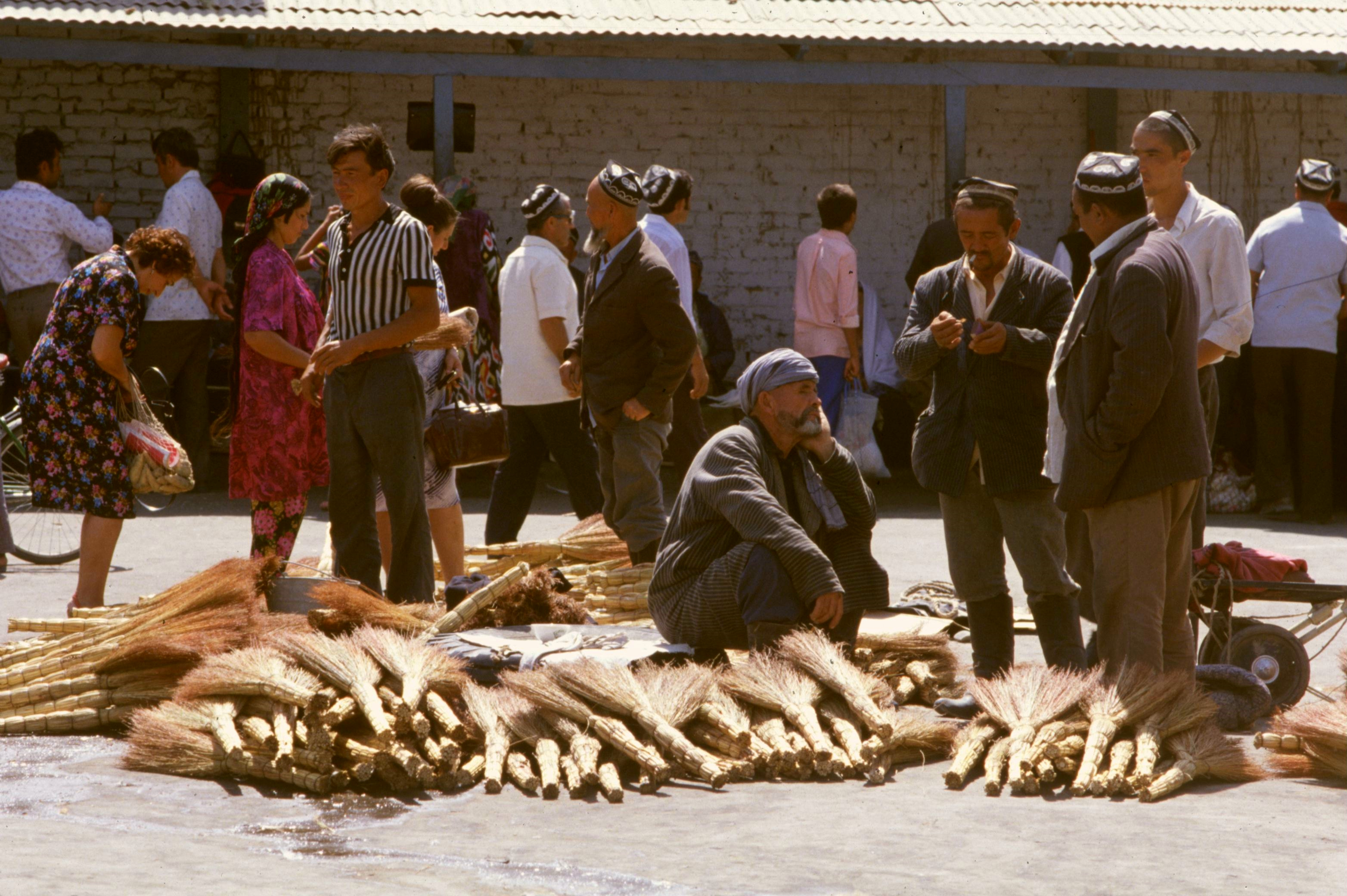 Samarkand, 1981, Straßenverkäufer mit Besen